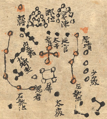 粵語: 太微垣，來自敦煌莫高窟古卷星圖